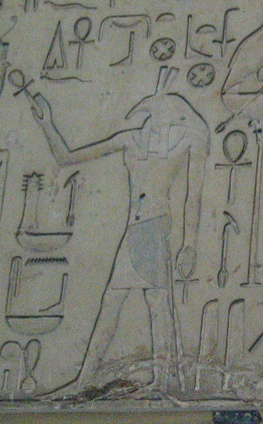 Seth offrant la vie au roi thoumosis